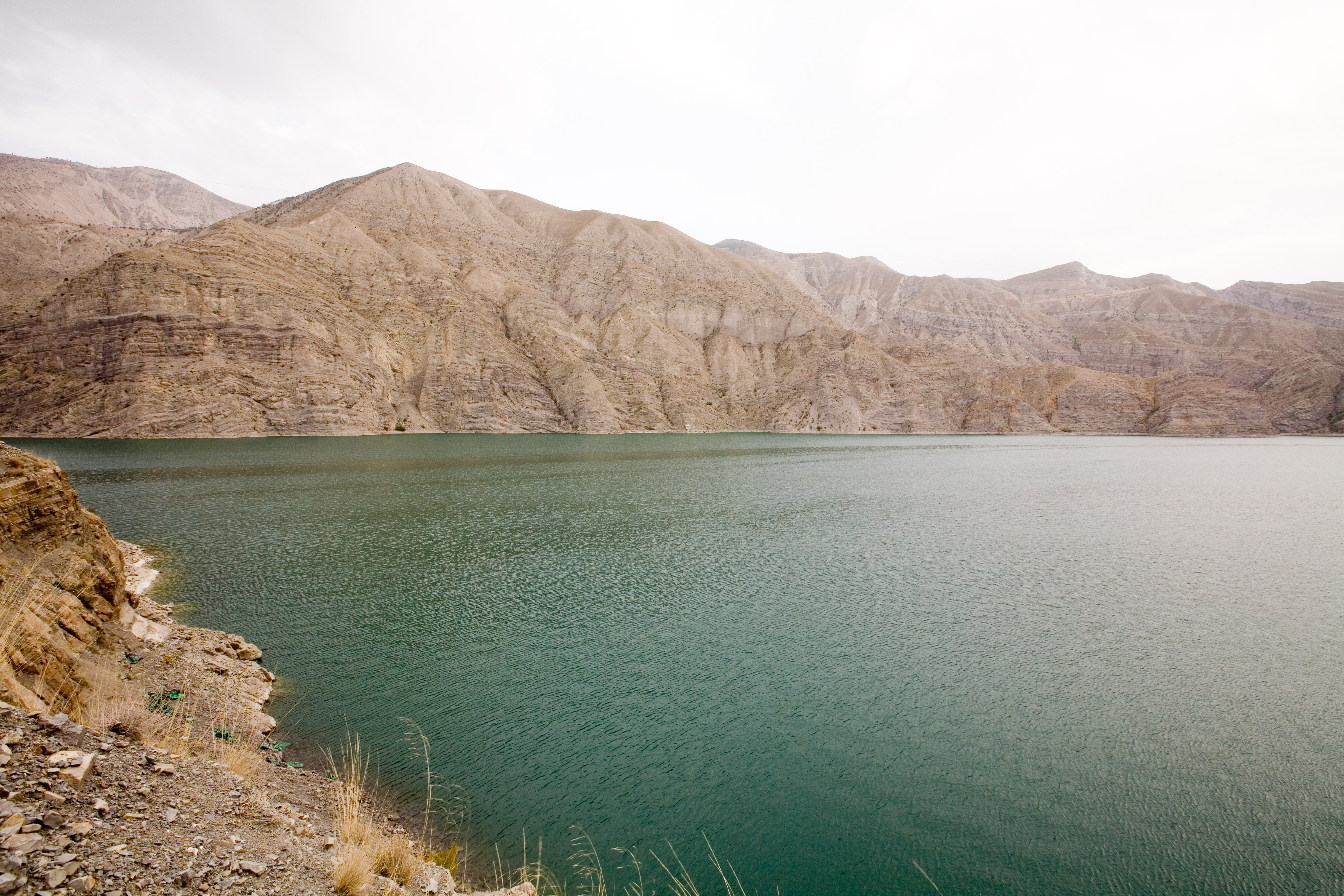 Tortum Dam Lake